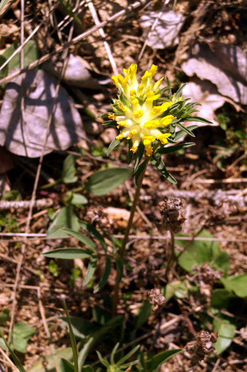 Pravi ranjak v Horjulu.